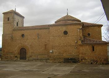 La iglesia de Chera